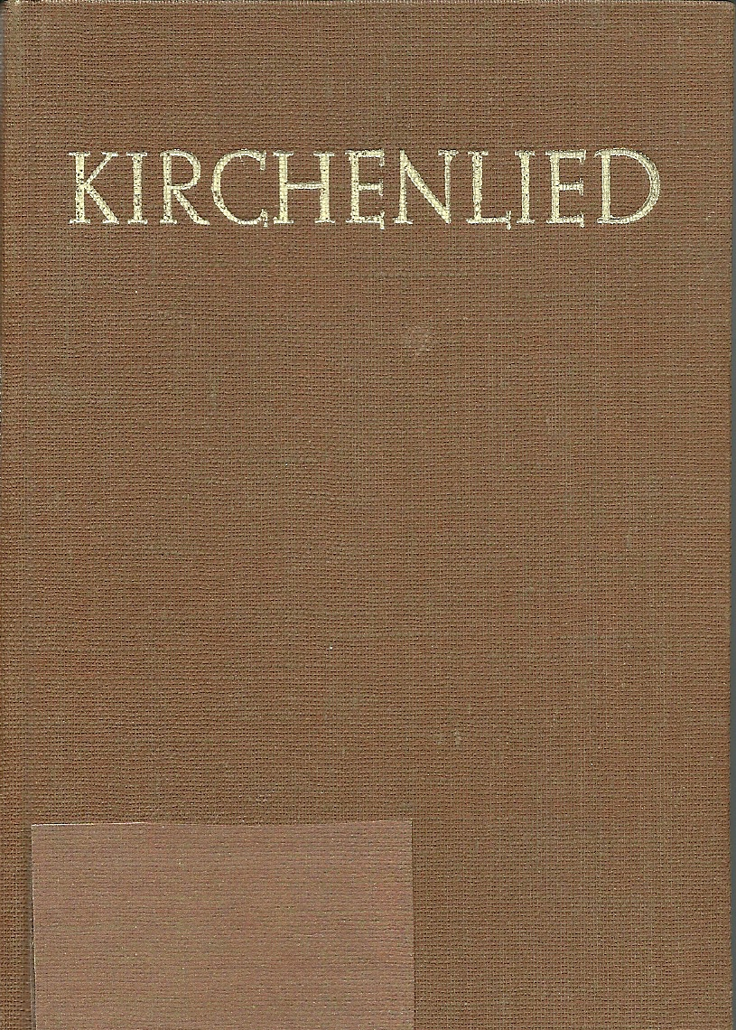 Kirchenlied. Eine Auslese geistlicher Lieder, Titelblatt der Notenausgabe 1957